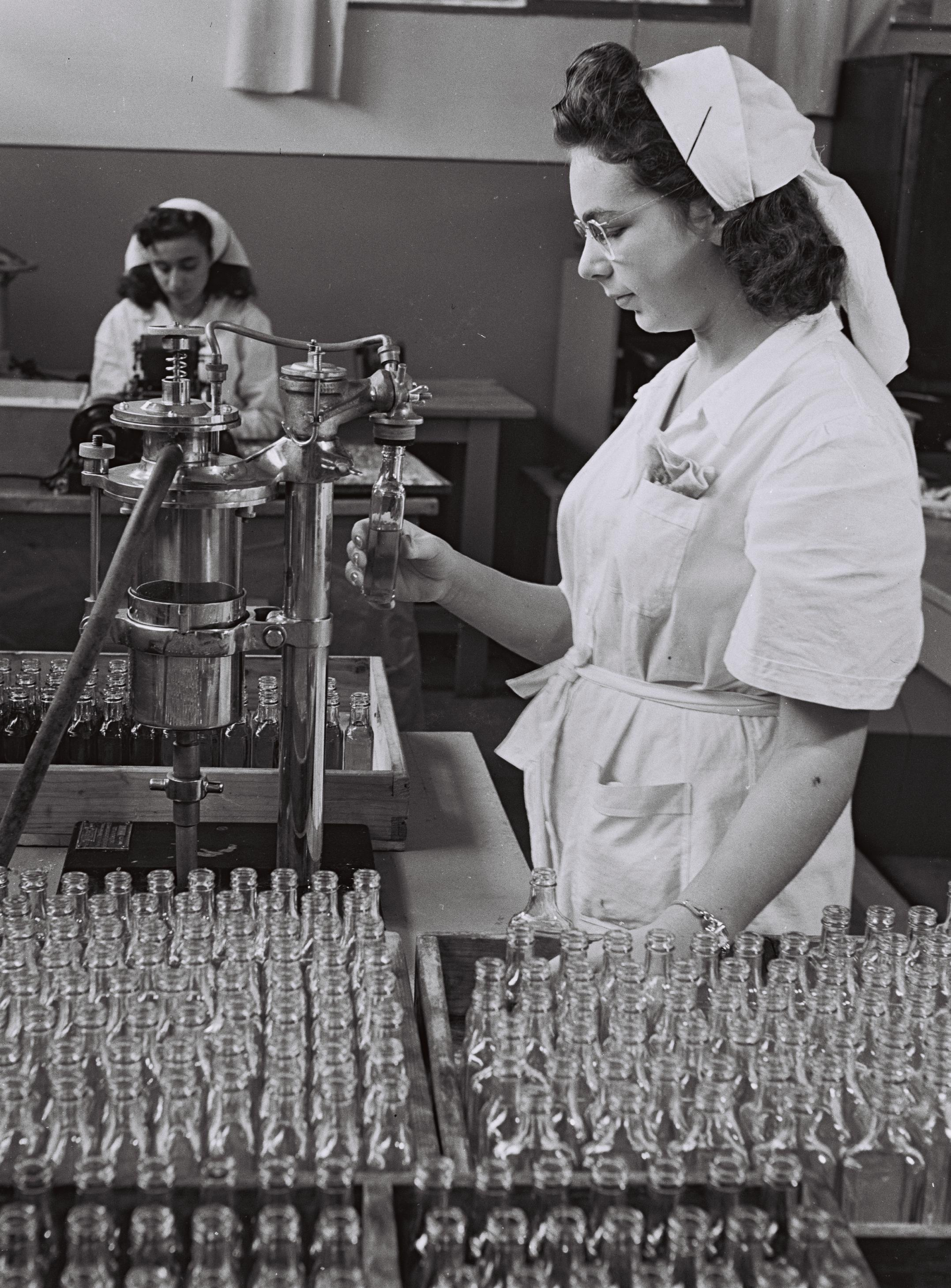 פועלת במפעל "אסיא"